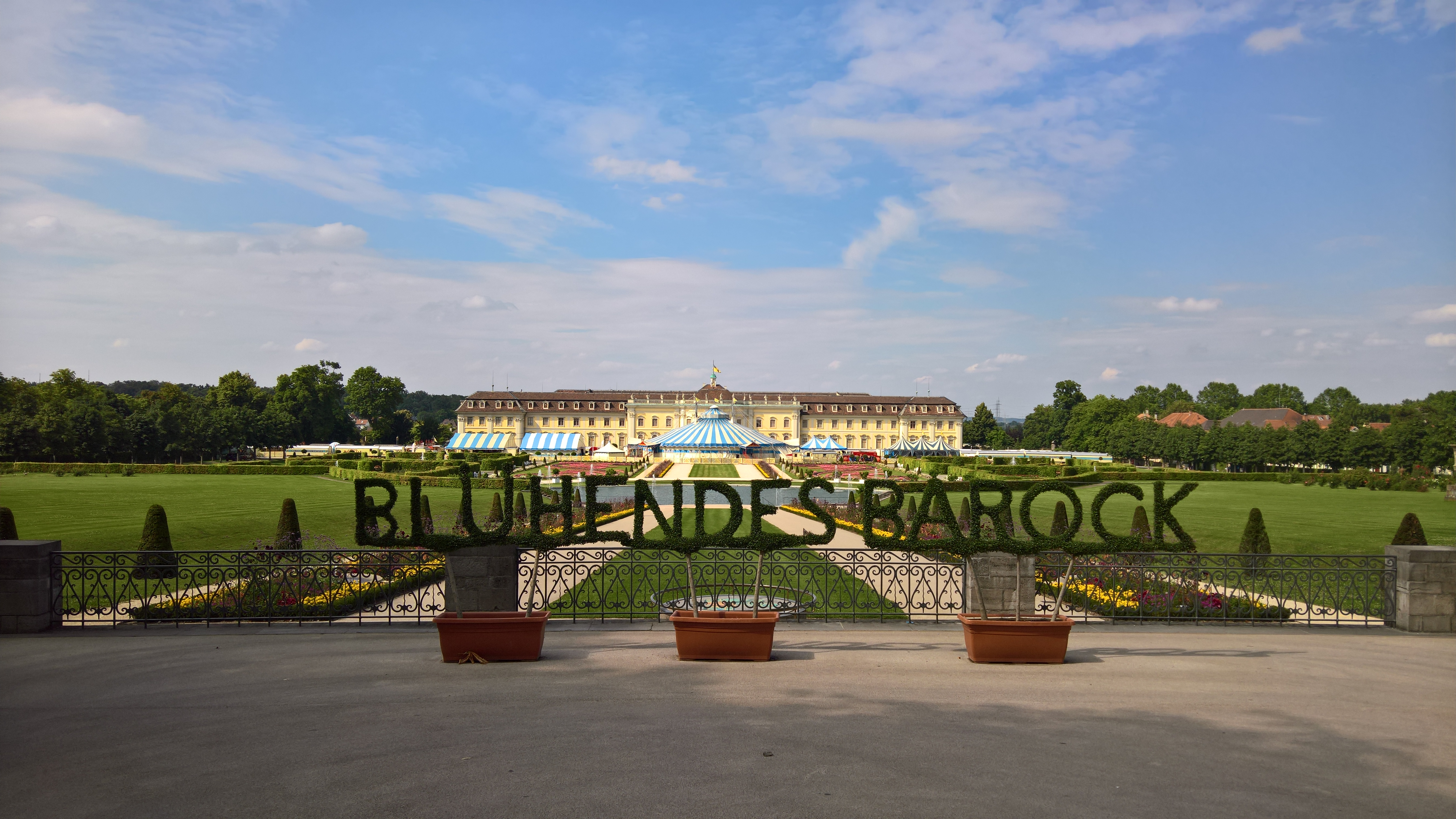 Circus Roncalli im Juli 2016 im Blühenden Barock in Ludwigsburg